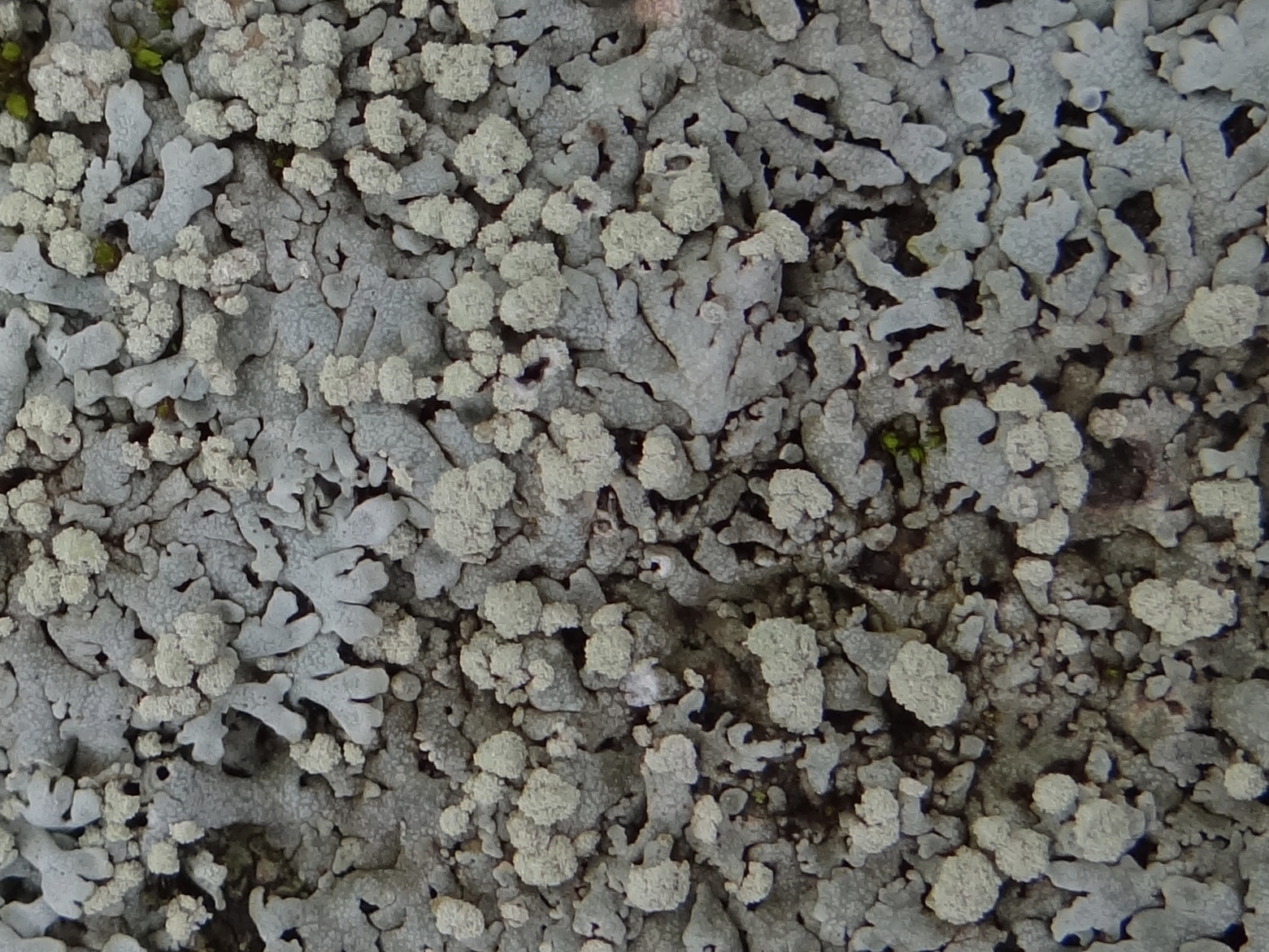 Soralia on Physcia caesia